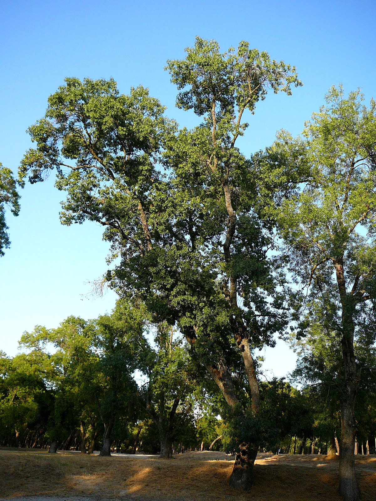 Fresno de hoja estrecha en la Casa de Campo de Madrid